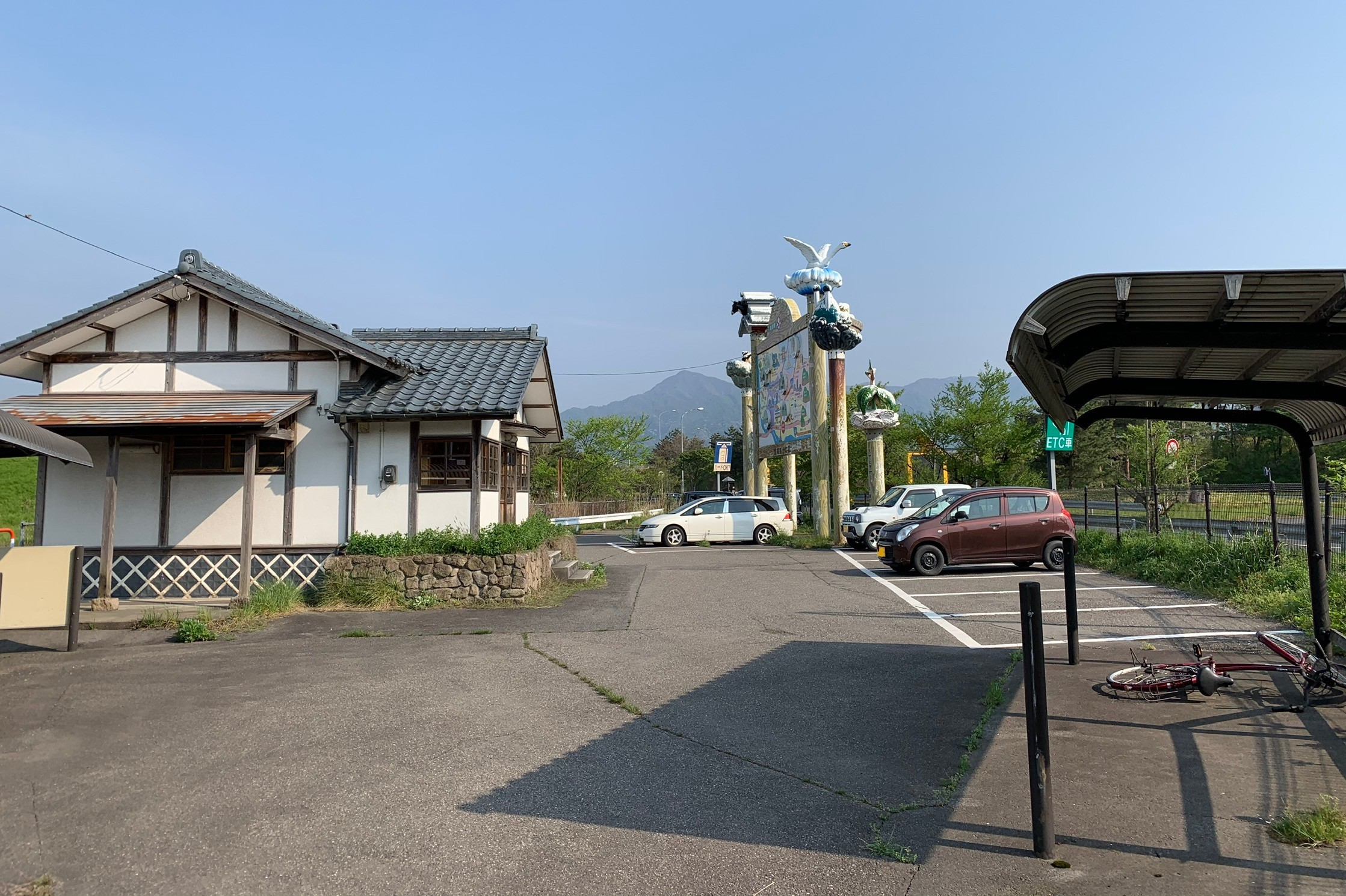 磐越道 安田バスストップ（安田インター前バス停）パークアンドライド駐車場（左側にも区画あり）や駐輪場、トイレなどが整備されている（2020年5月）